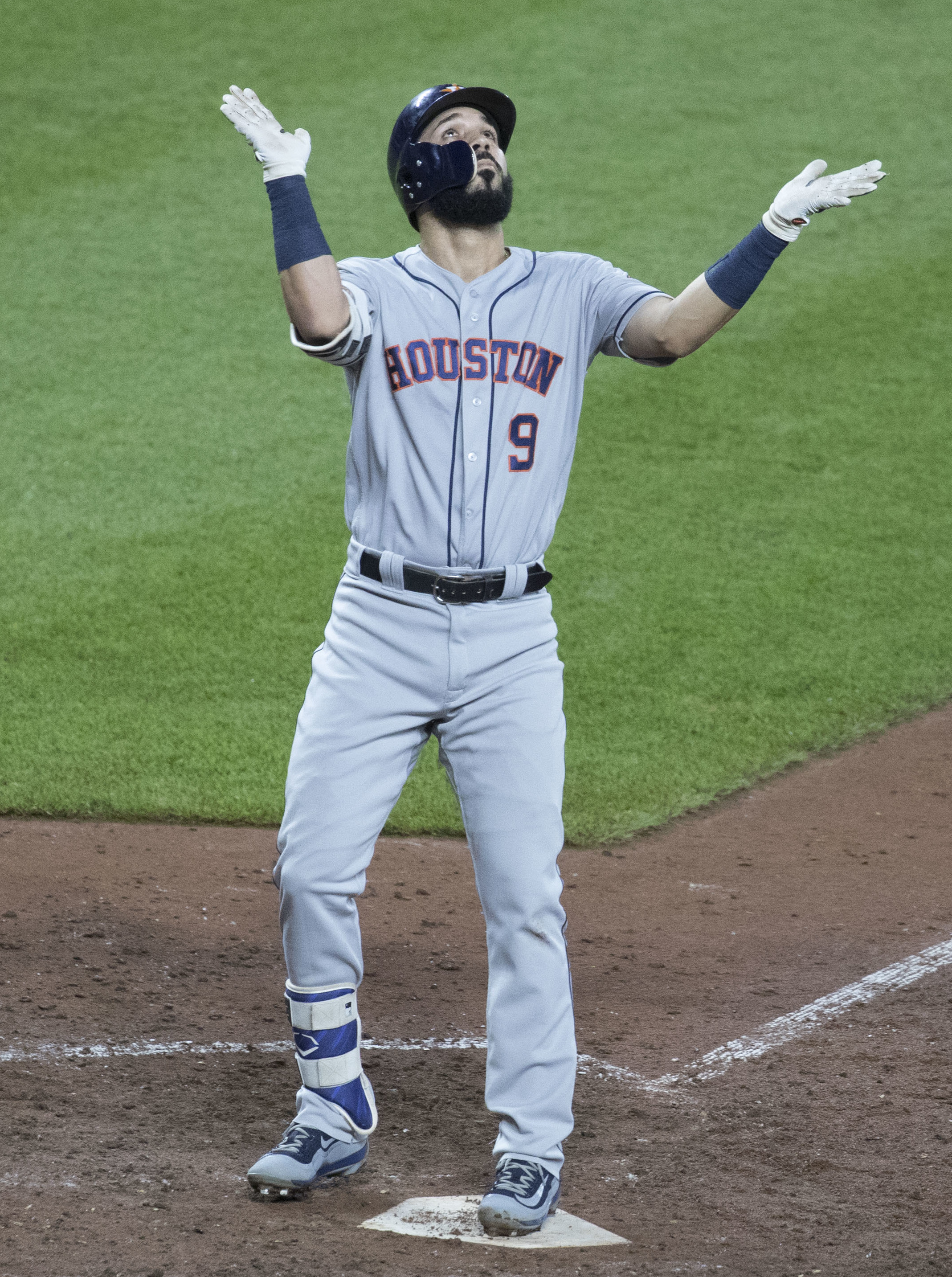 Astros at Orioles 7/22/17